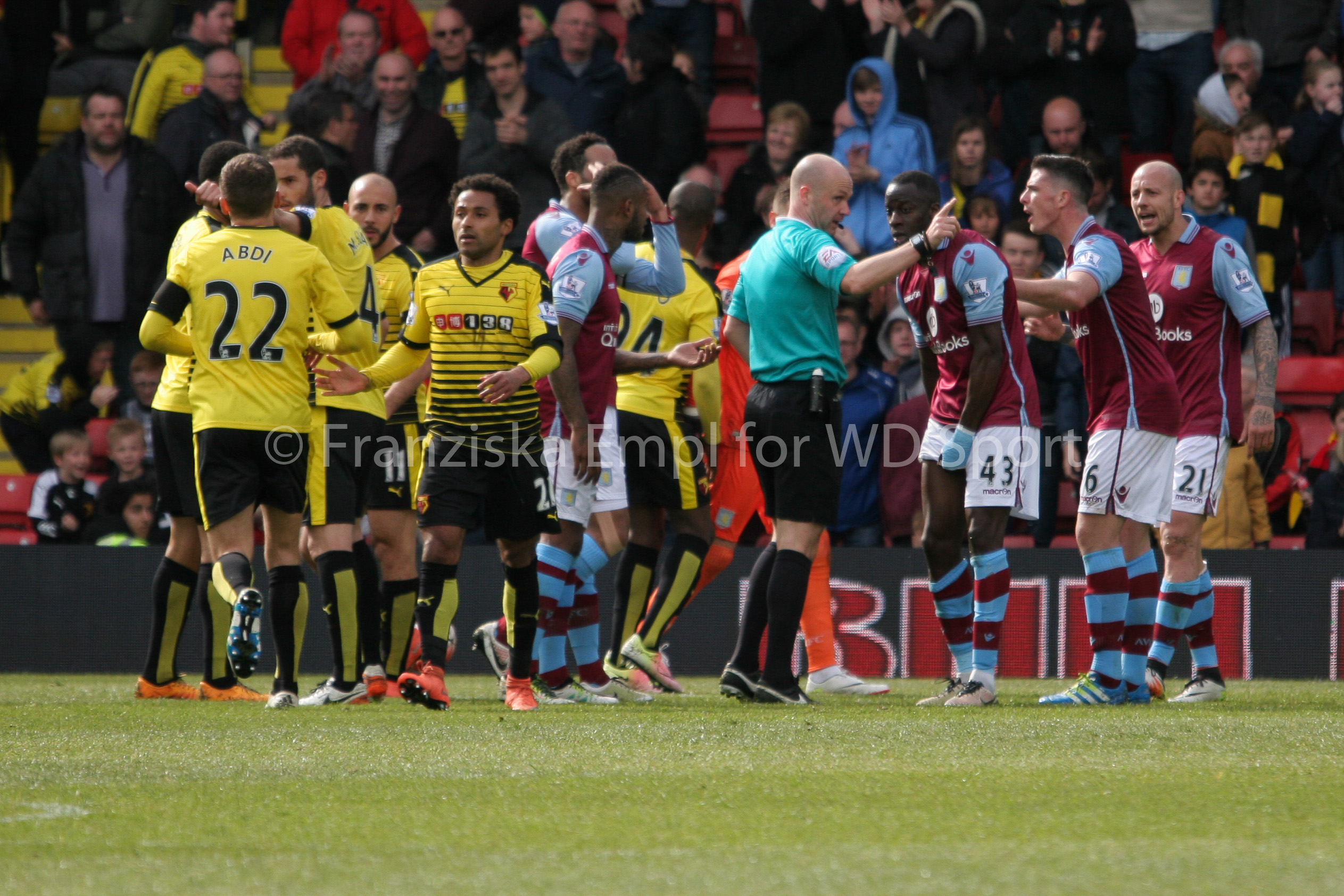 160430 Watford v Aston Villa-777